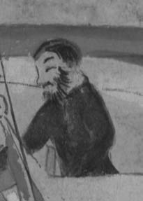 沖縄県立博物館所蔵「八重山風俗絵図」のなかに描かれた西常央